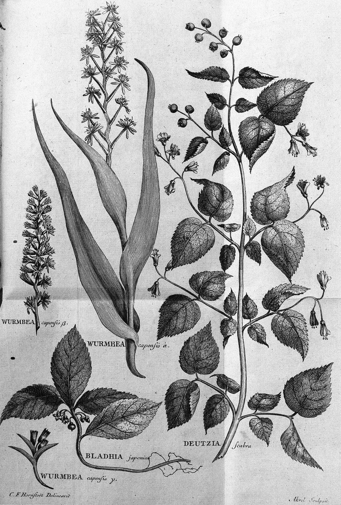 plants from Japan and the Cape region in the doctoral thesis of Carl Fredrik Hornstedt